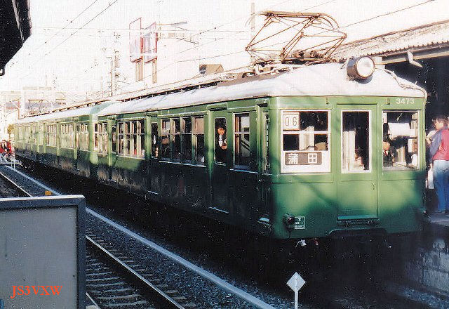 初代東急3000系電車です(目蒲線時代)